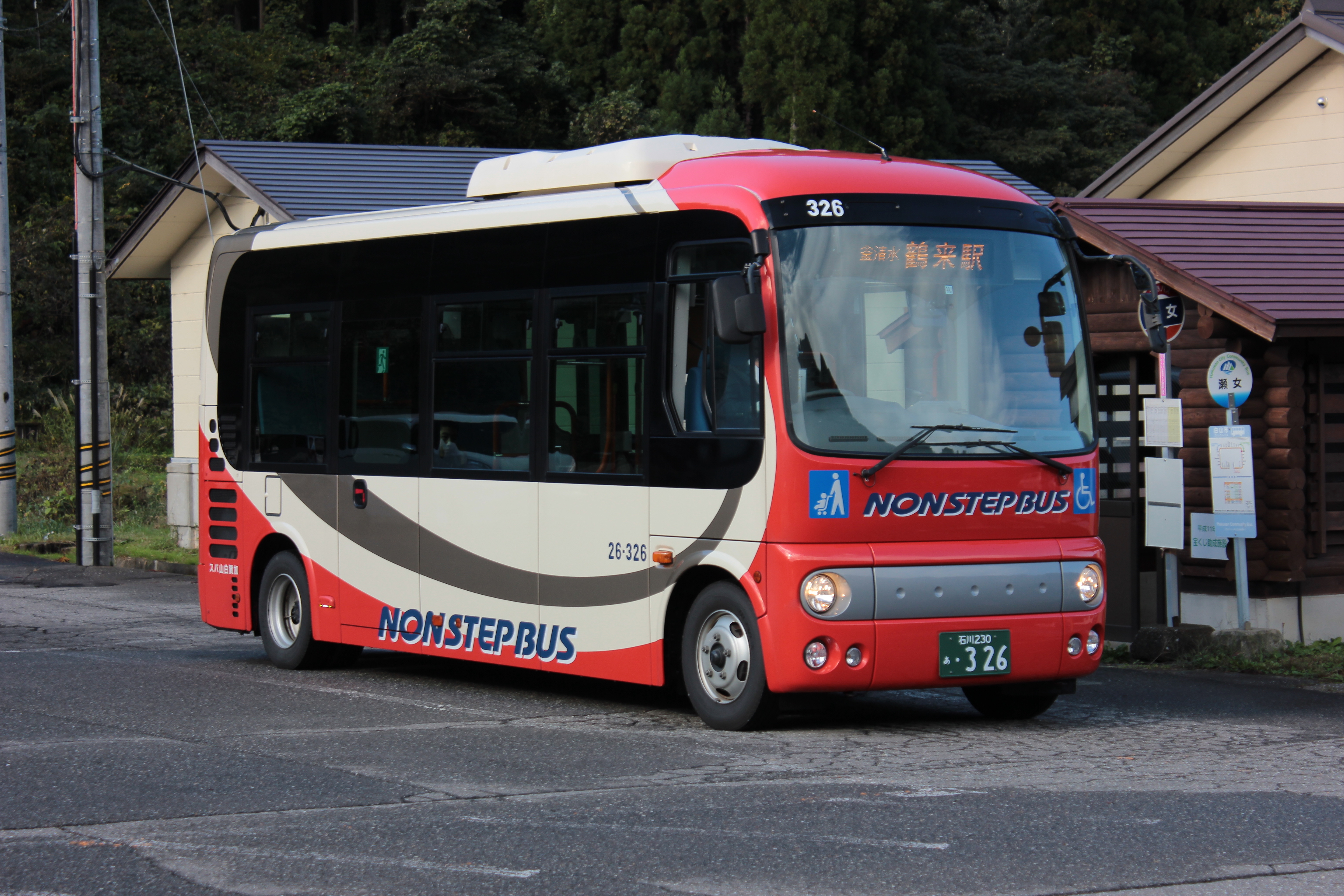 加賀白山バスの日野・ポンチョ（道の駅瀬女にて） Canon EOS Kiss X5